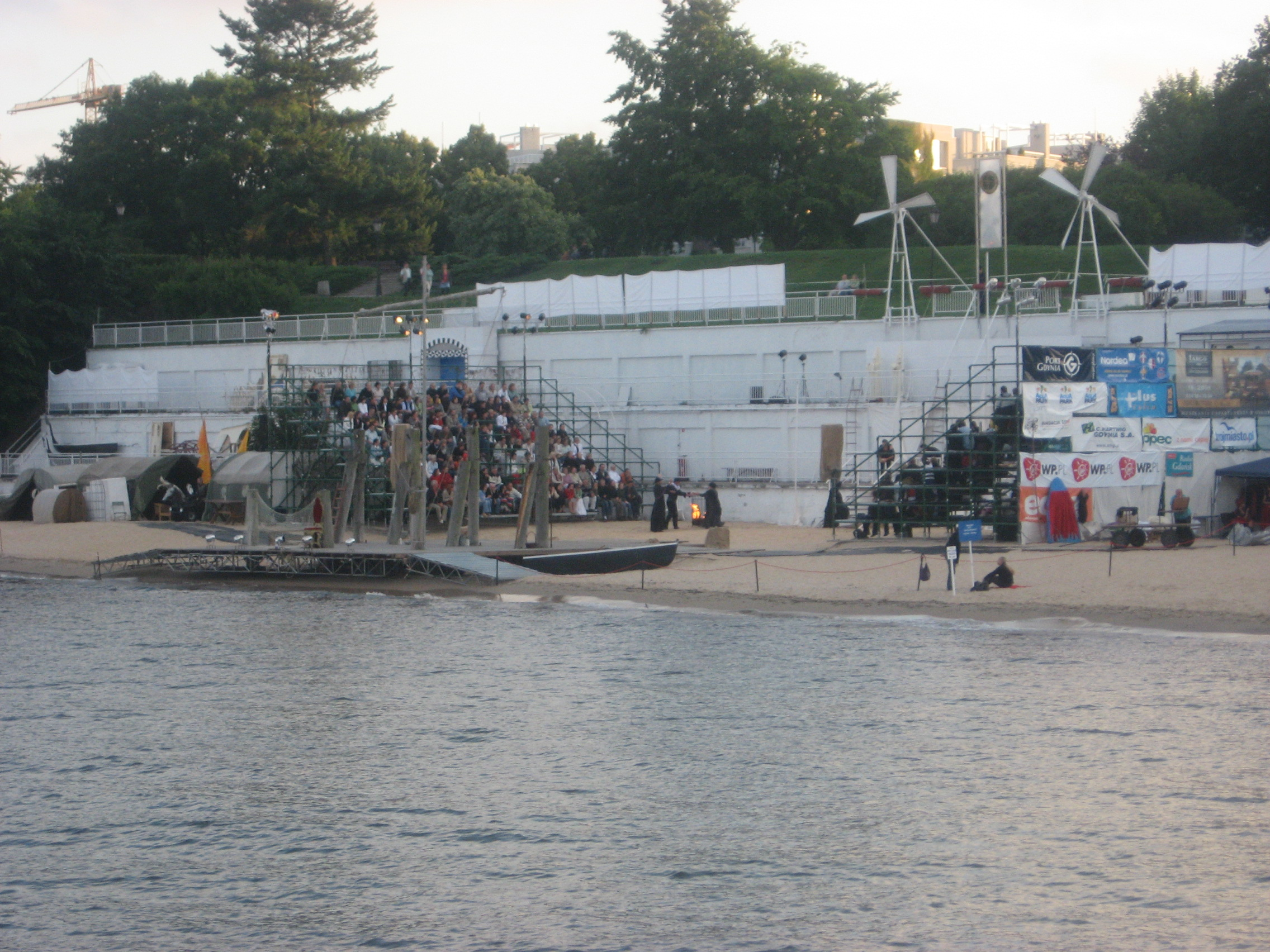 Scena Letnia Teatru Miejskiego w Gdyni Orłowie. Widok z mola podczas spektaklu Don Kichote (reż. Jacek Bunsch).